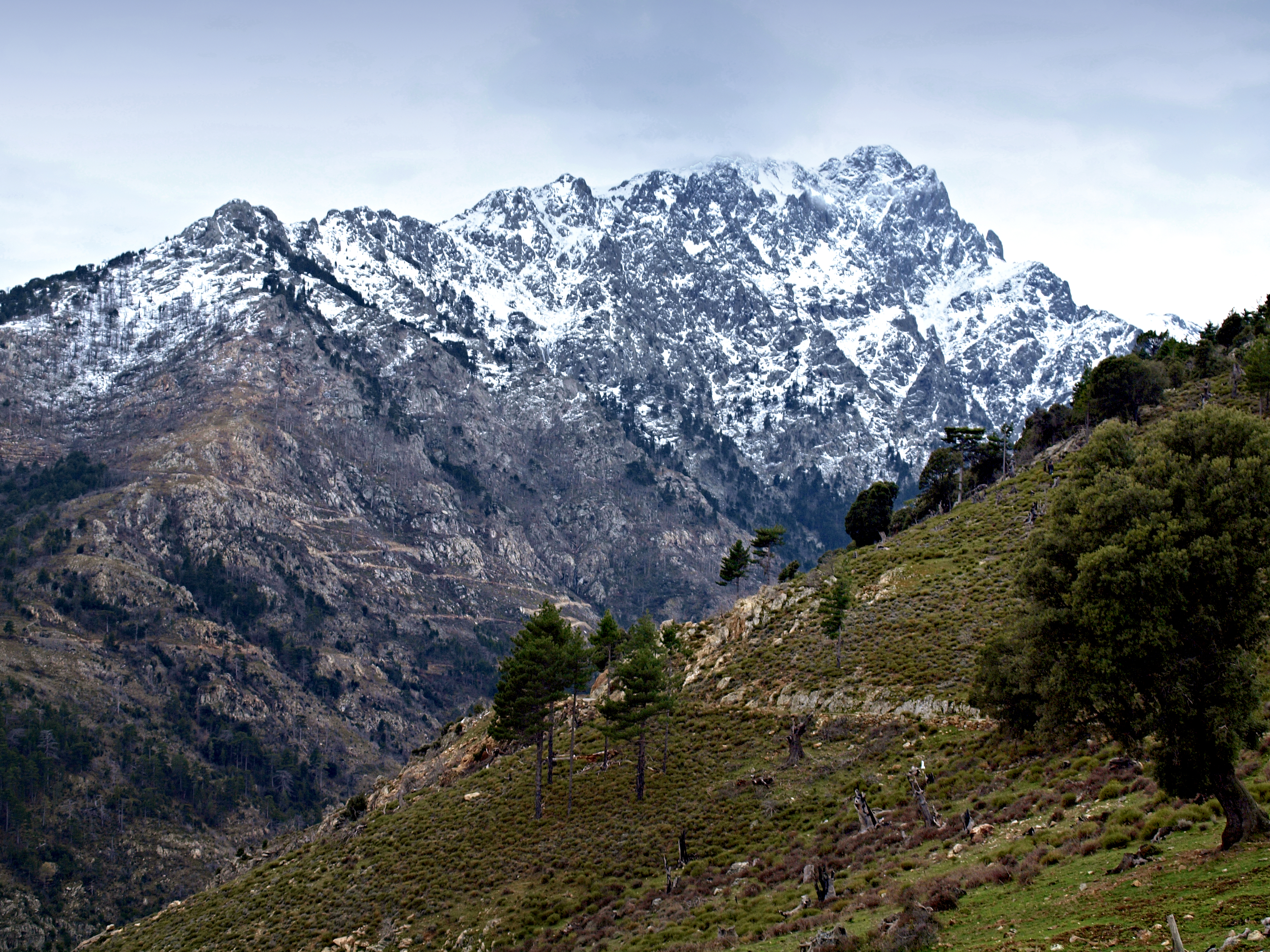 Olmi-Cappella (Corsica) - Monte-Padro